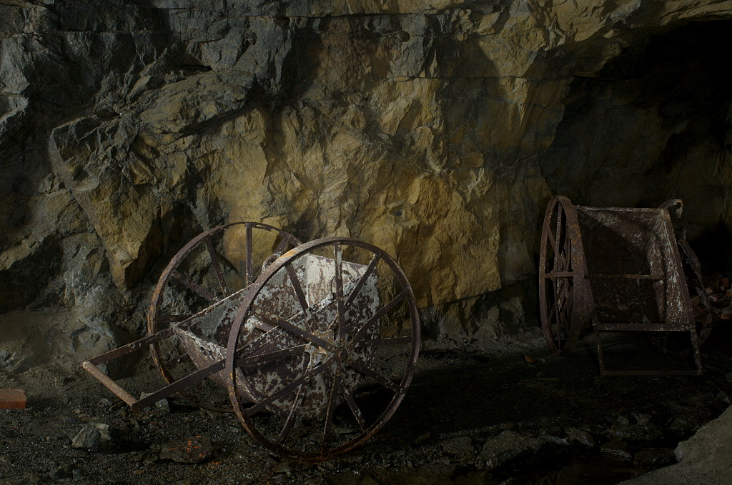 Etterlatenskaper fra byggingen av tunnelanlegget bak en av kanonstillingene ved Vardås fort